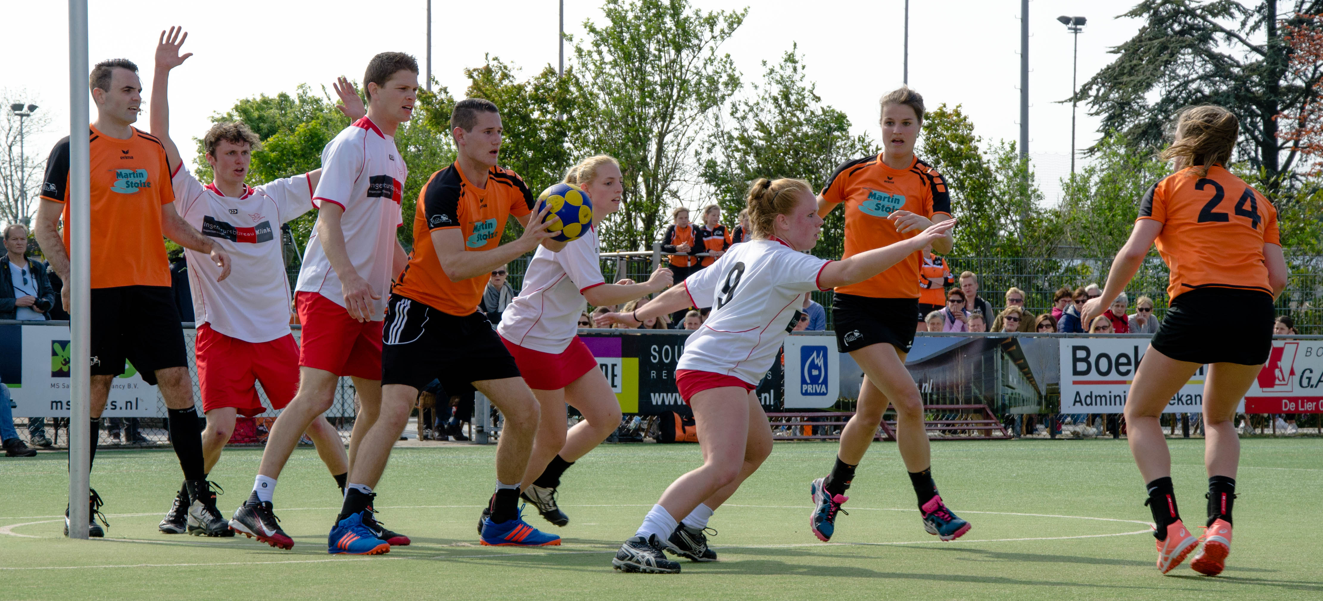 Valto 1